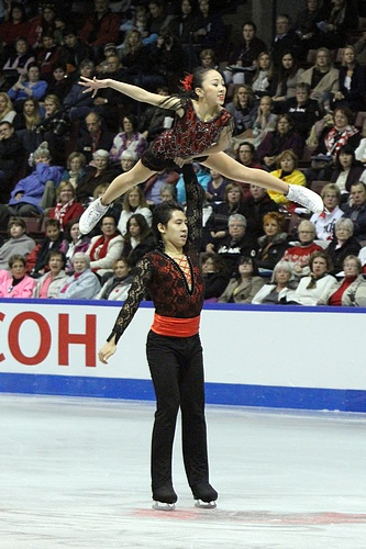 Суй Вэньцзин и Хань Цун на 2011 Skate Canada International